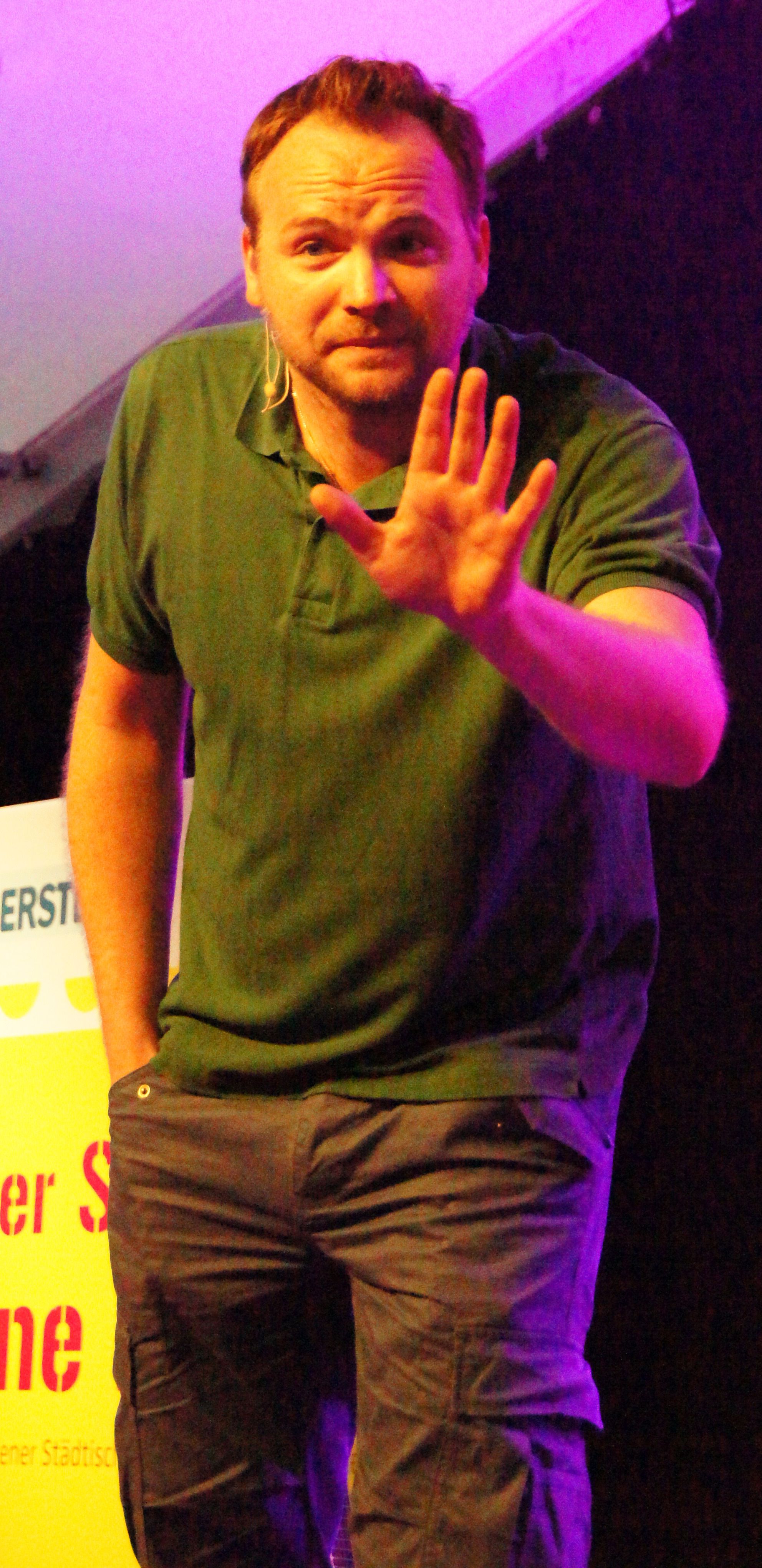 Vienna - Stadtfest - DA Stipsits, sooissa